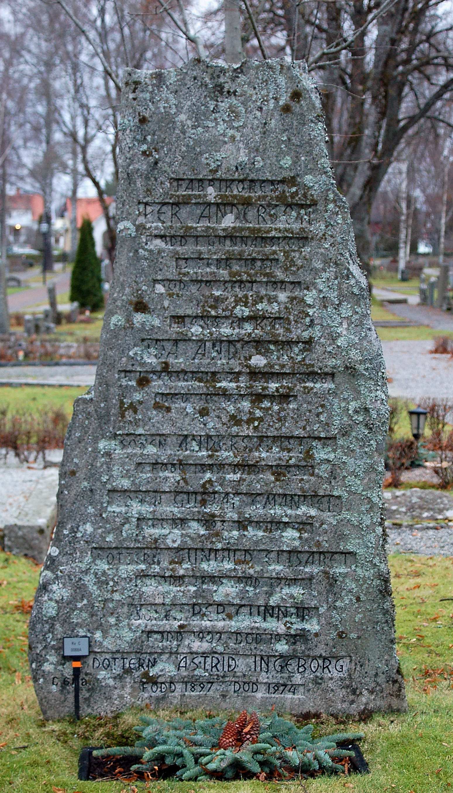 Gravvård för Arvikaverkens grundare Per Anderson (1861-1942) skapad av arkitekten Ludvig Mattson.